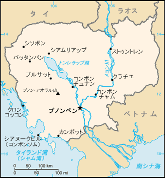 カンボジア地図 - CIA Factbookより日本語化。掲載地名: カンポット、クラチエ、クロンコッコン、コンポンソム、コンポンチャム、コンポンチュナン、シアヌークビル、シアムリアップ、シソポン、シャム湾、ストゥントレン、タイランド湾、トンレサップ湖、バッタンバン、プノン・アオラル山、プノンペン、プルサット、メコン川。